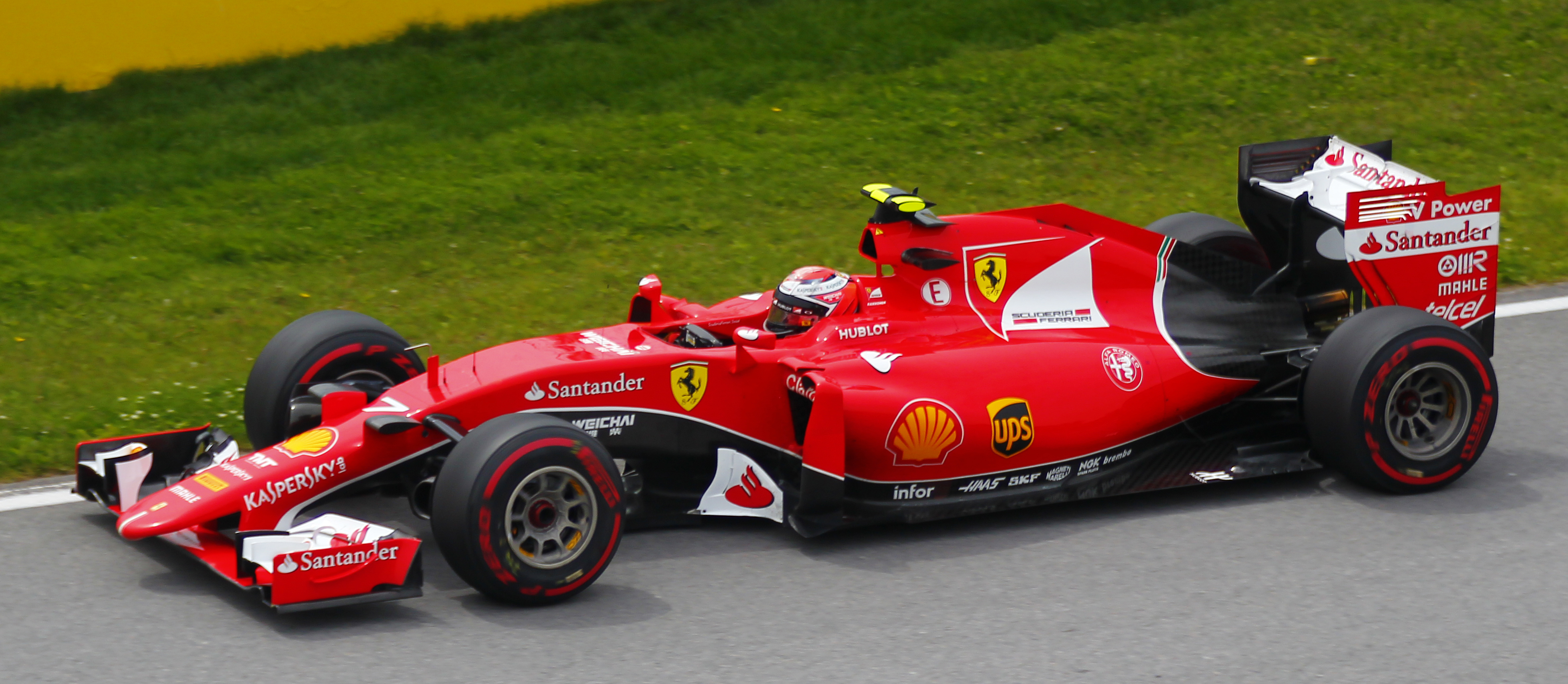 Kimi Raïkkönen - Scuderia Ferrari - Grand Prix du Canada - Circuit Gilles-Villeneuve - 7 juin 2015 (Photo Paul-Émile Poulin-Jacques)